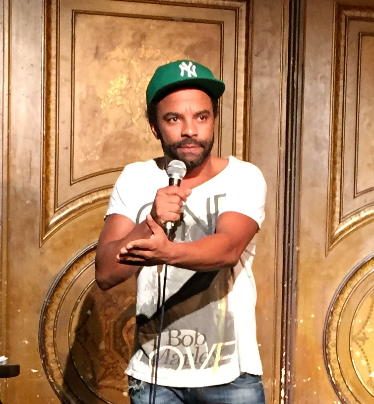 Simon Pearce Vereinsheim München